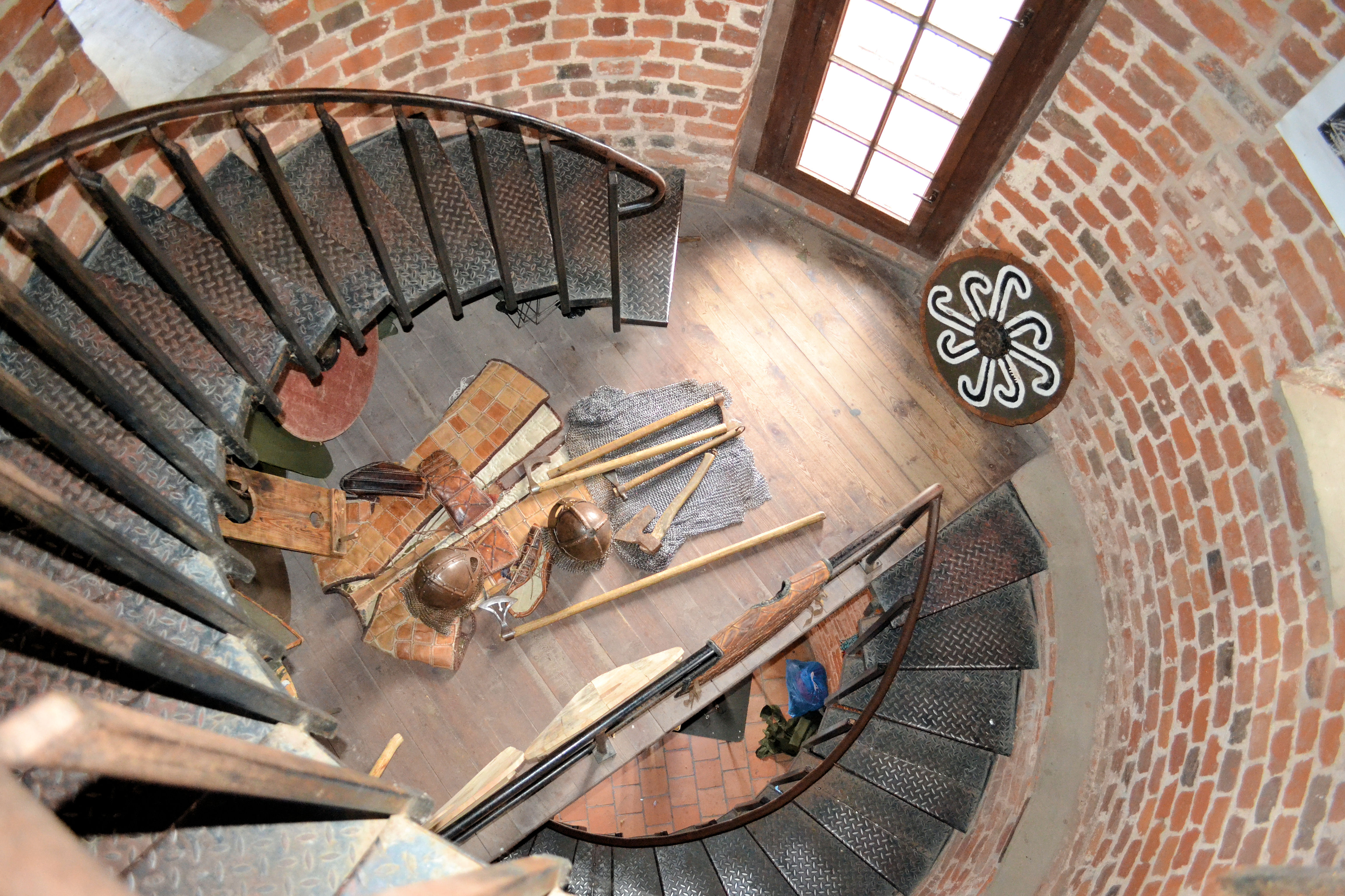 Trzebiatów, obwarowania miejskie: Baszta Kaszana (wnętrze)